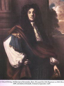 Sir Edward Dering, 3rd Baronet (1650-1689)